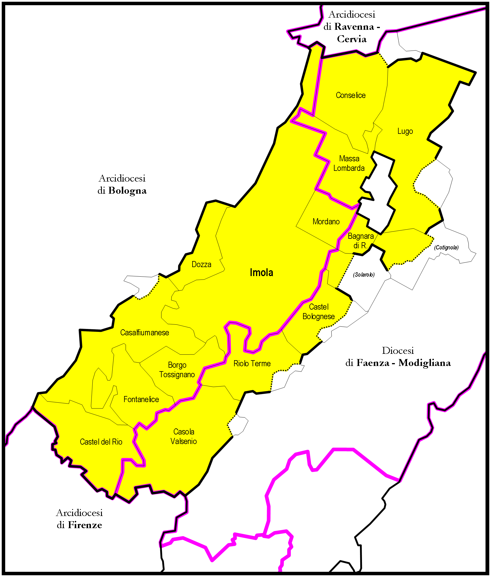 Mappa della Diocesi di Imola